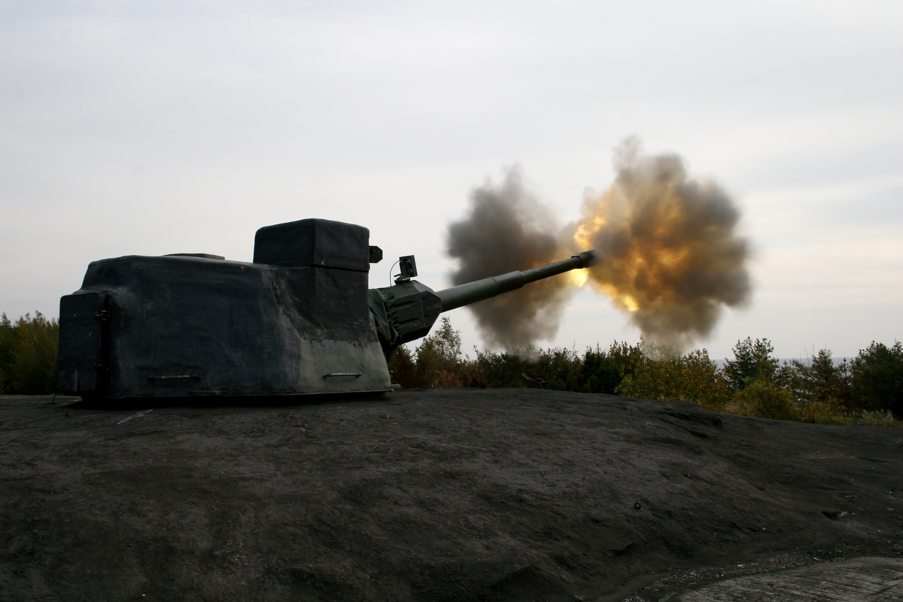 This gun is in Isosaari (Finland) and its 130 millimetre cannon